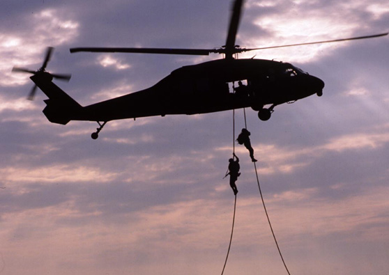 Soldat der Special Forces beim Abseilen von einem Blackhawk.